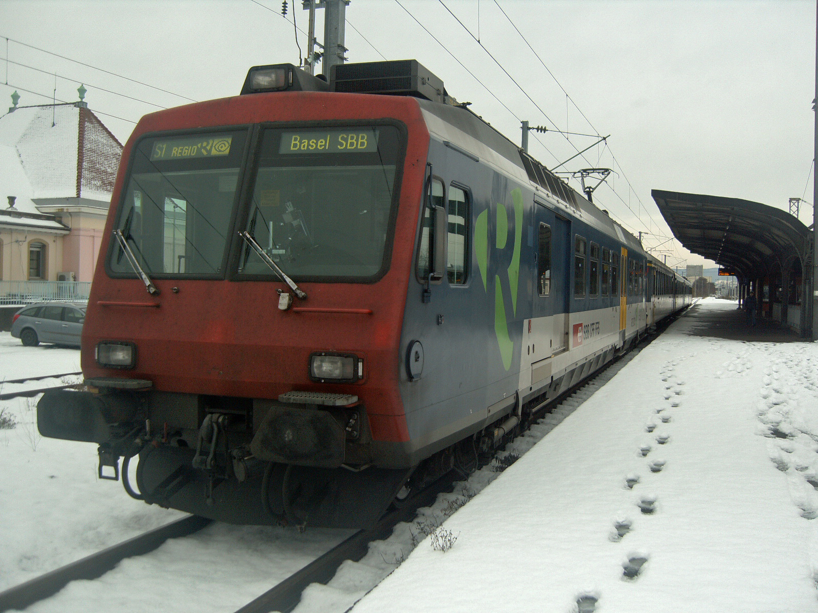 Une rame suisse Colibri des CFF en service sur la ligne 1 du Regio S-Bahn Bâle (ici, entre Saint-Louis et Bâle CFF) en décembre 2009.